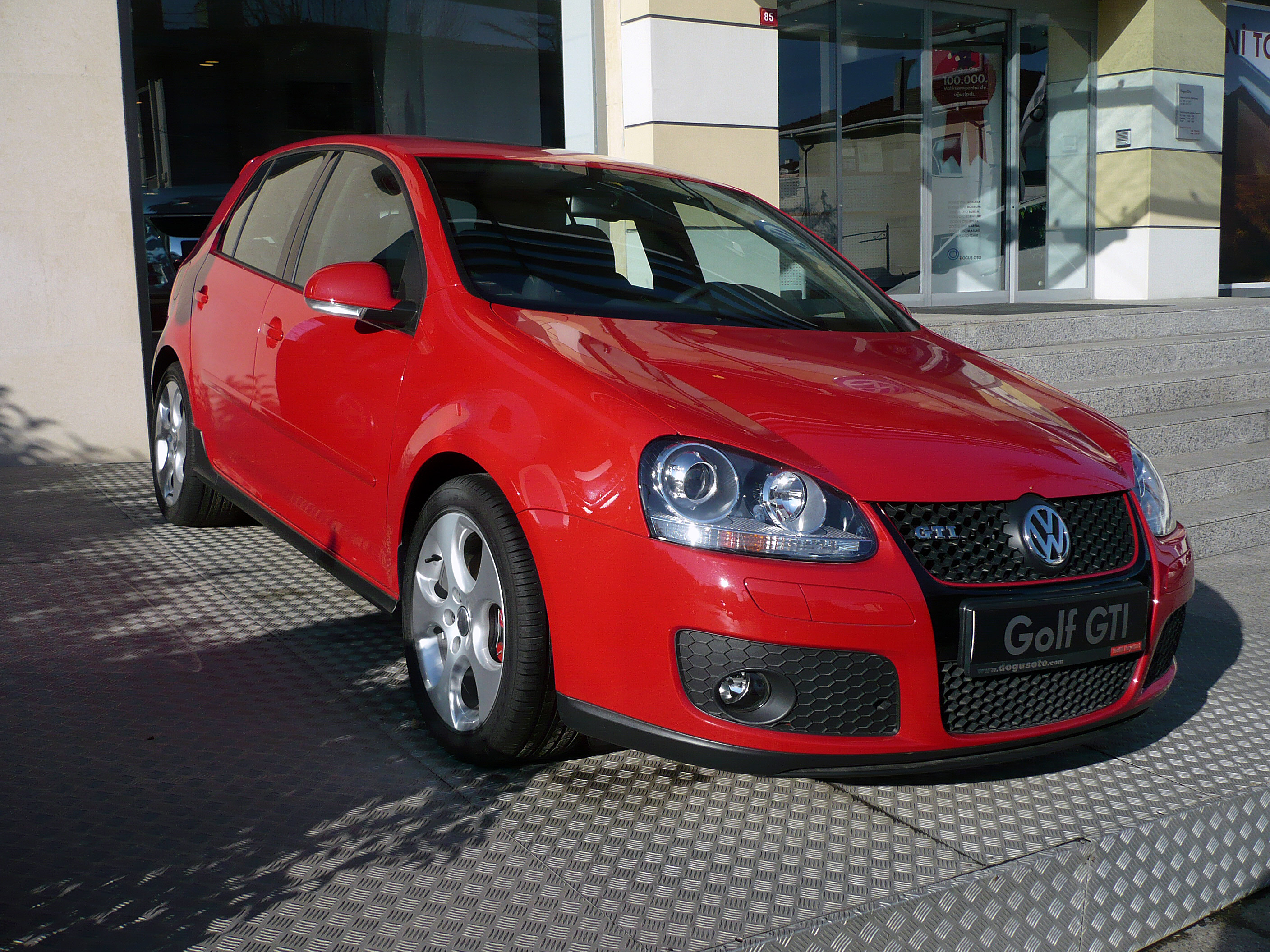 2008 Volkswagen Golf GTI